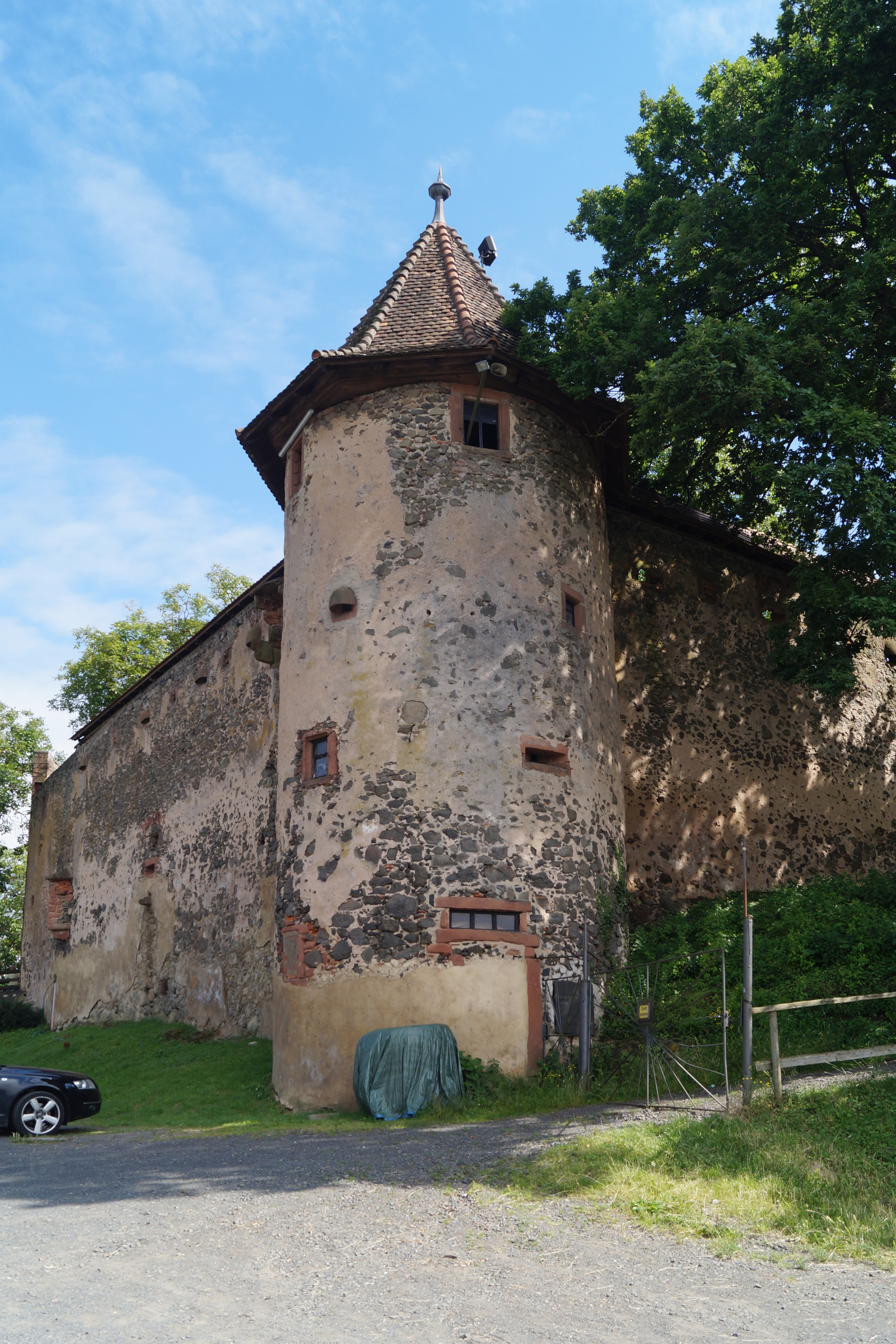 Burg Ronneburg, Hessen, Außenansicht des sogenannten Zyngel (Teil der Vorburg) mit Befestigungsturm, daran Maul- und Schlüsselscharten zur Flankierung der Mauer.